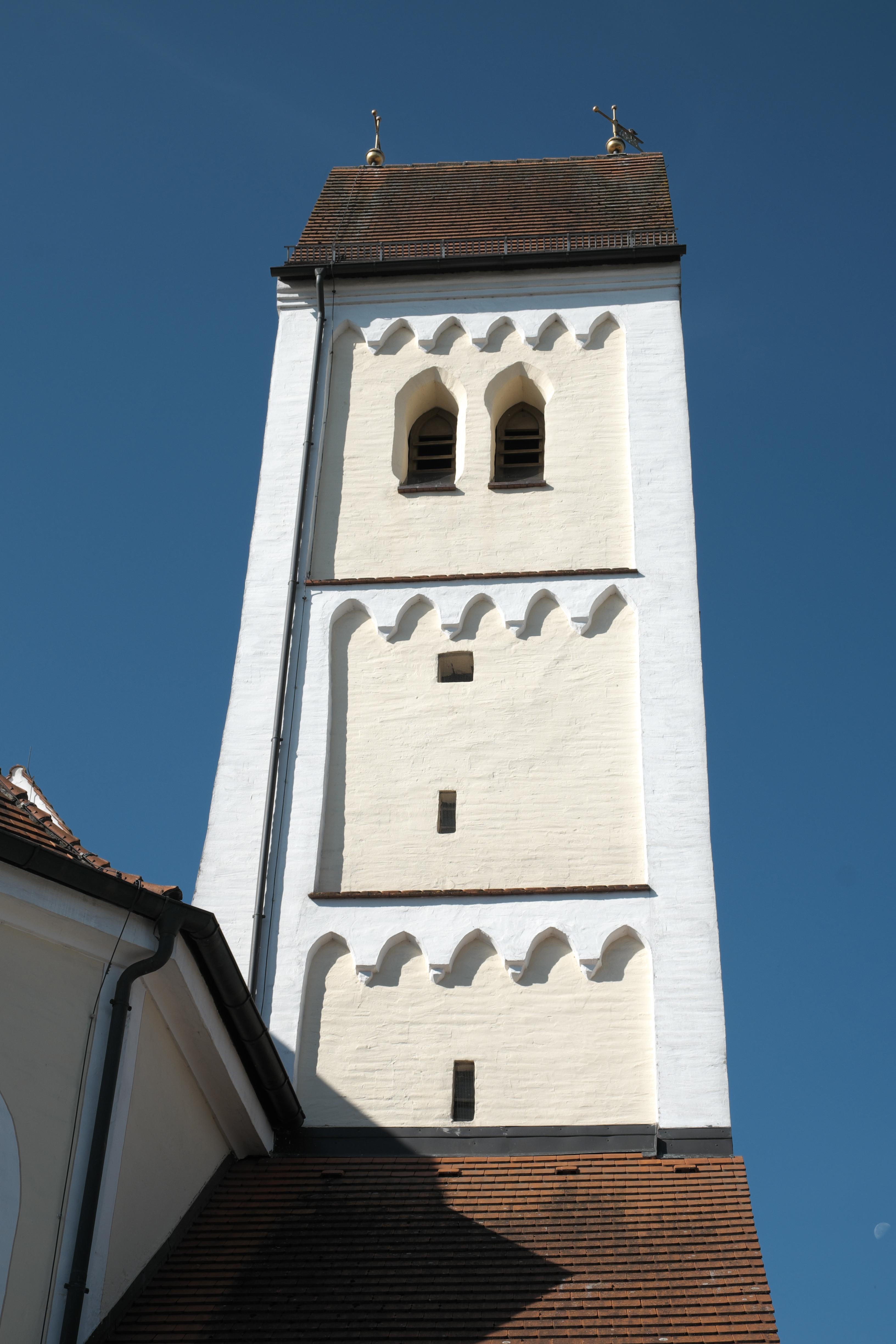 Katholische Pfarrkirche St. Martin in Penzing im Landkreis Landsberg am Lech (Bayern/Deutschland)